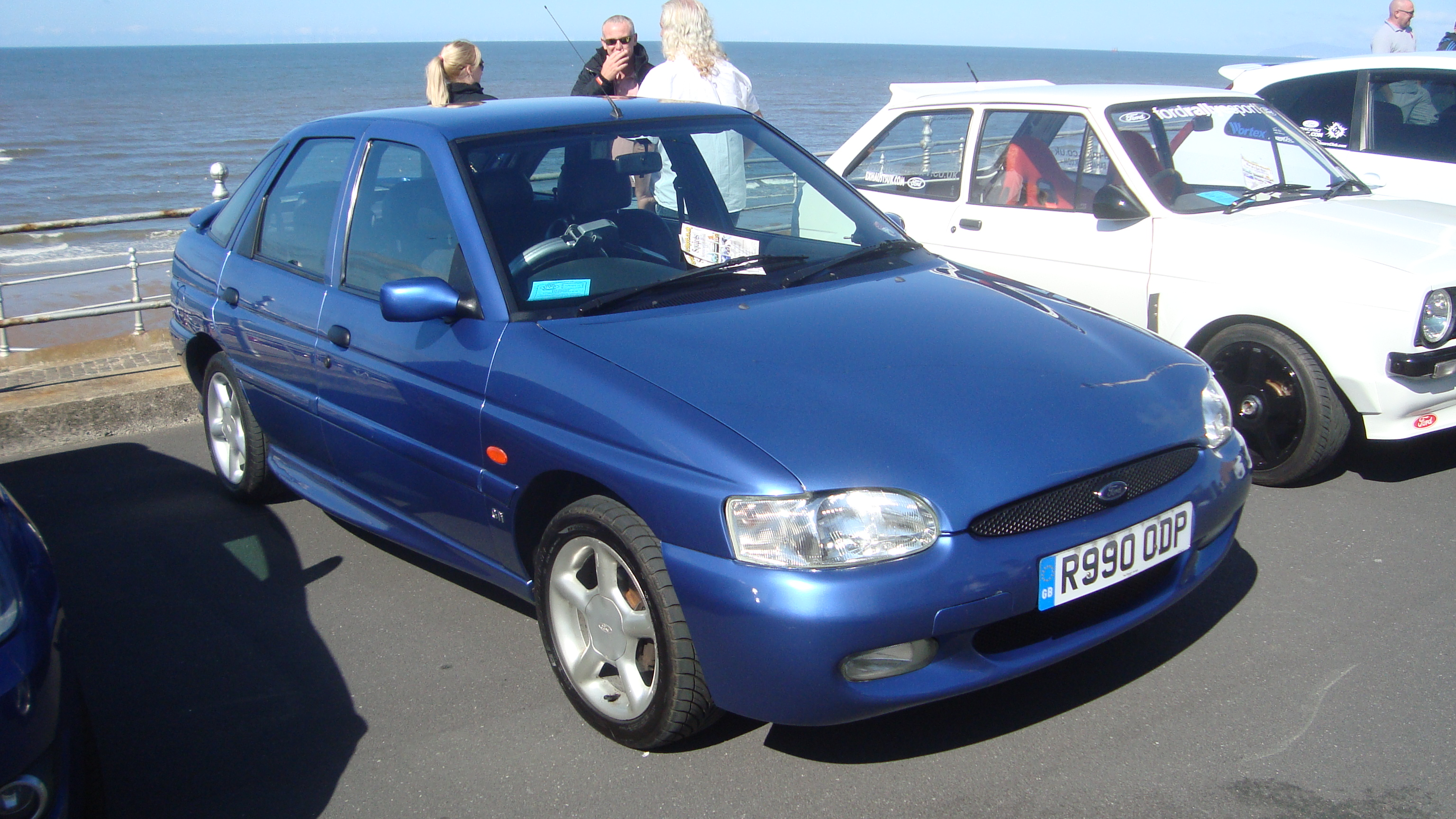 1998 Ford Escort 1.8 GTi